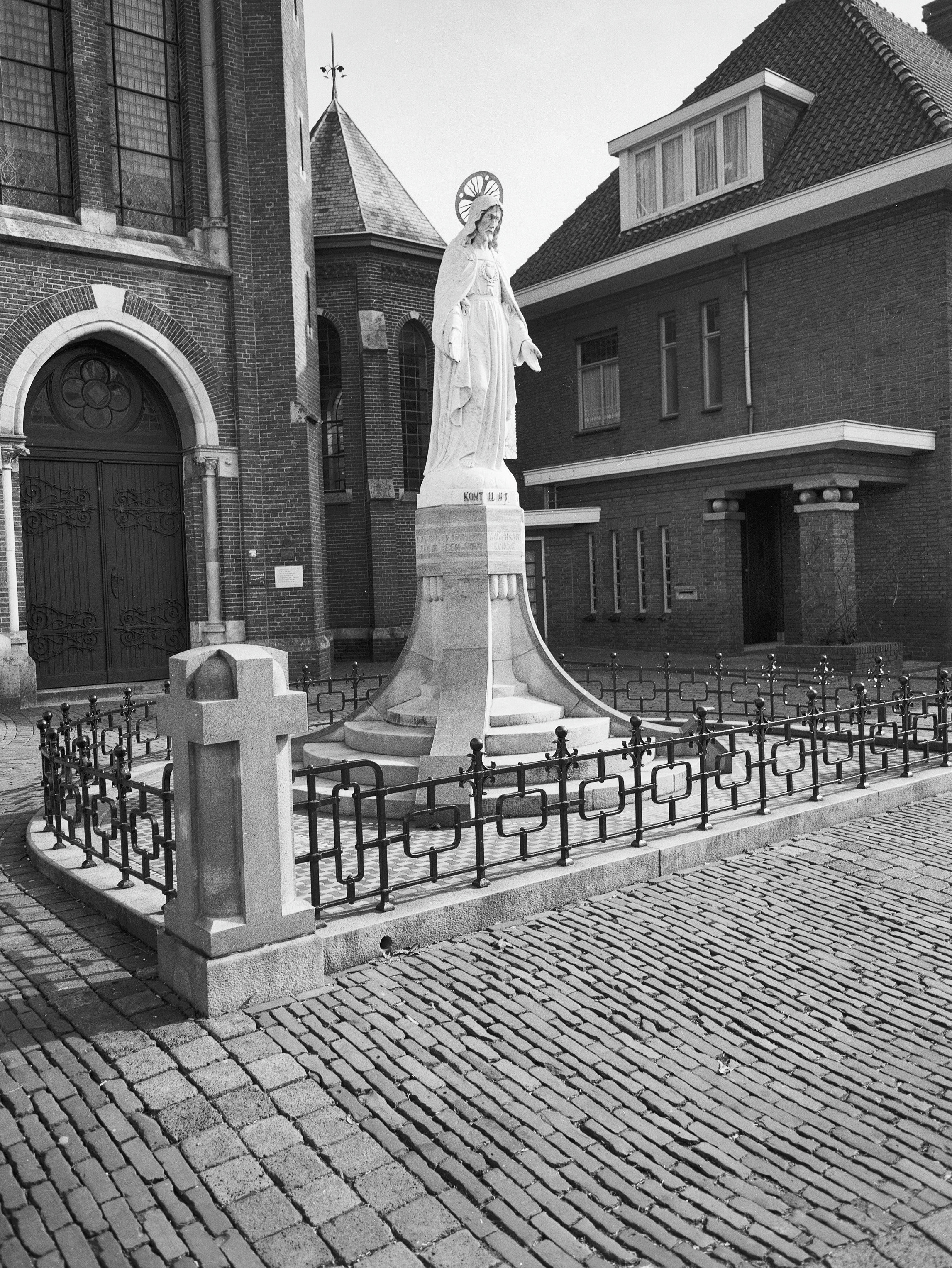 Exterieur Heilig Hart beeld